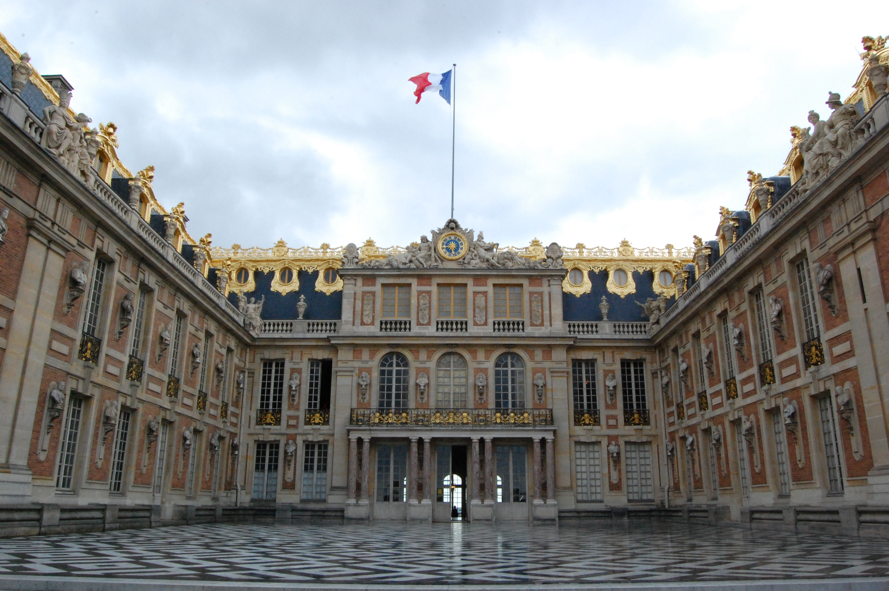 Château de Versailles (cour de Marbre) et drapeau français